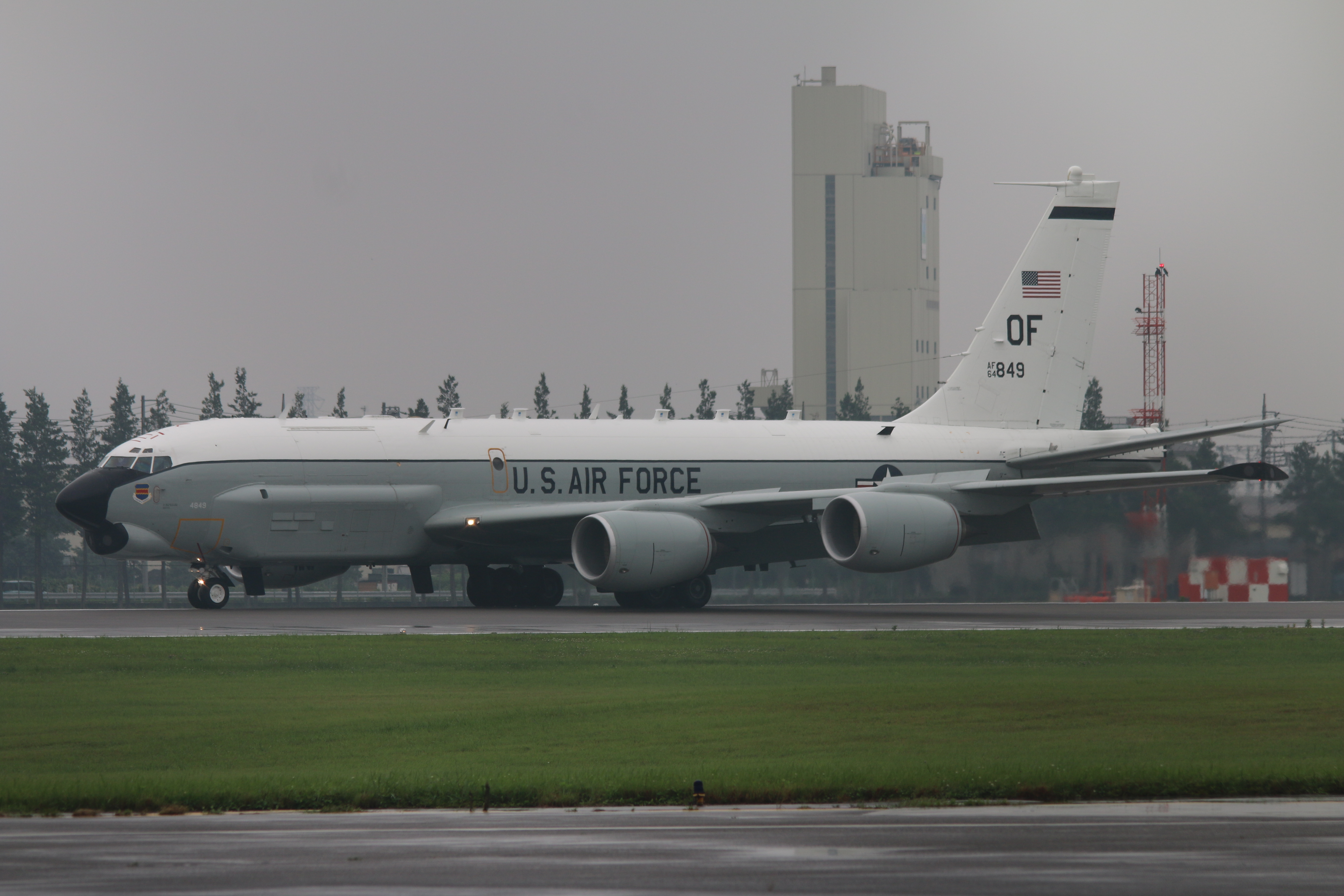 Yokota air base 2015.7.8 RC-135U 64-14849